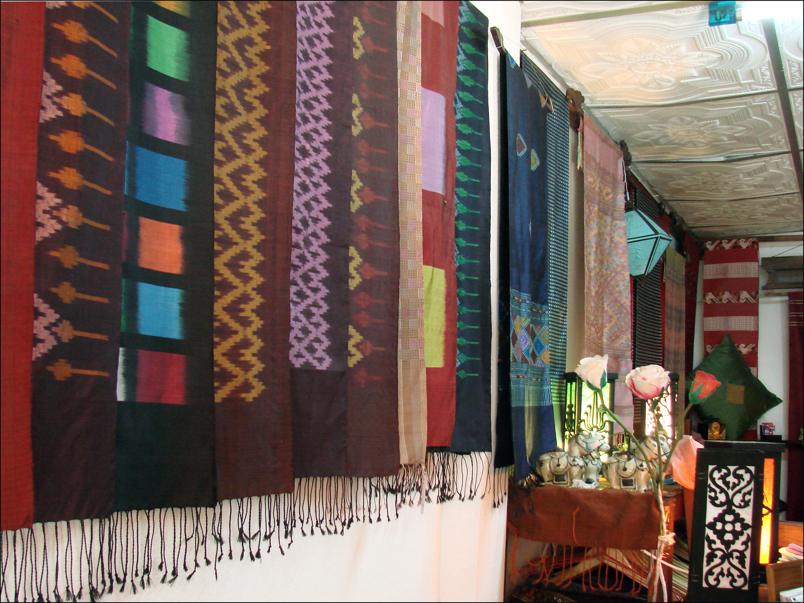 Le village de Ban Xang Khong s’est spécialisé dans la confection et la vente des produits issus de la soie et du papier Saa (papier réalisé avec l’écorce du mûrier).